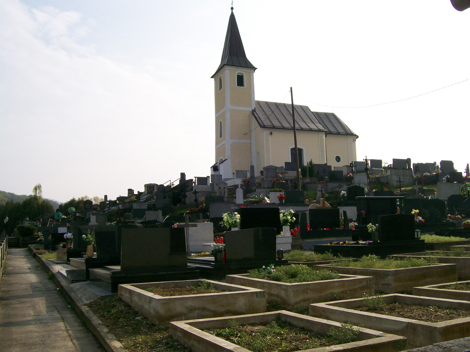 Kapela i mjesno groblje Dubravica/Rozga, Zagrebačka županija